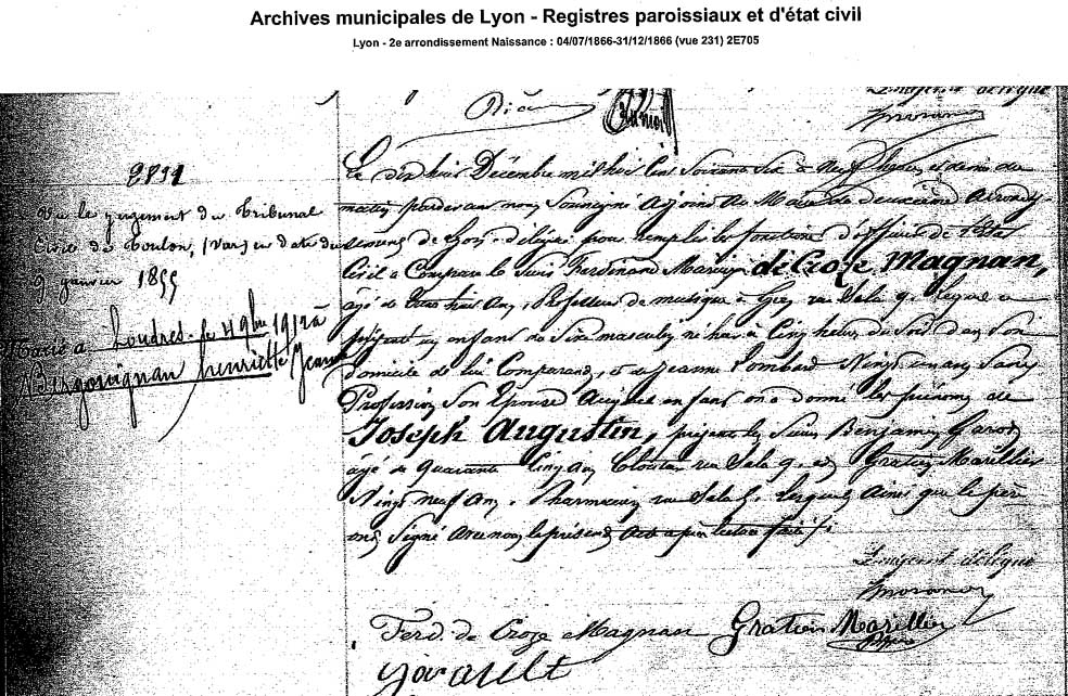 Etat civil paroissial de Lyon